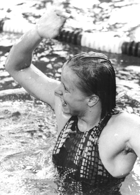 Kornelia Ender ADN-ZB Mittelstädt 1.6.76 Berlin: 27. Meisterschaften der DDR im Sportschwimmen-Die Weltmeisterin und Titelverteidigerin Kornelia Ender (SC Chemie Halle) ist überglücklich nach dem Sieg im Entscheidungslauf über 100 m Freistil der Damen. Mit 55,73s sorgte sie für den zweiten Weltrekord des ersten Wettkampftages. Ihre alte Rekordmarke stand seit den Weltmeisterschaften des vergangenen Jahres in Cali auf 56,22s.